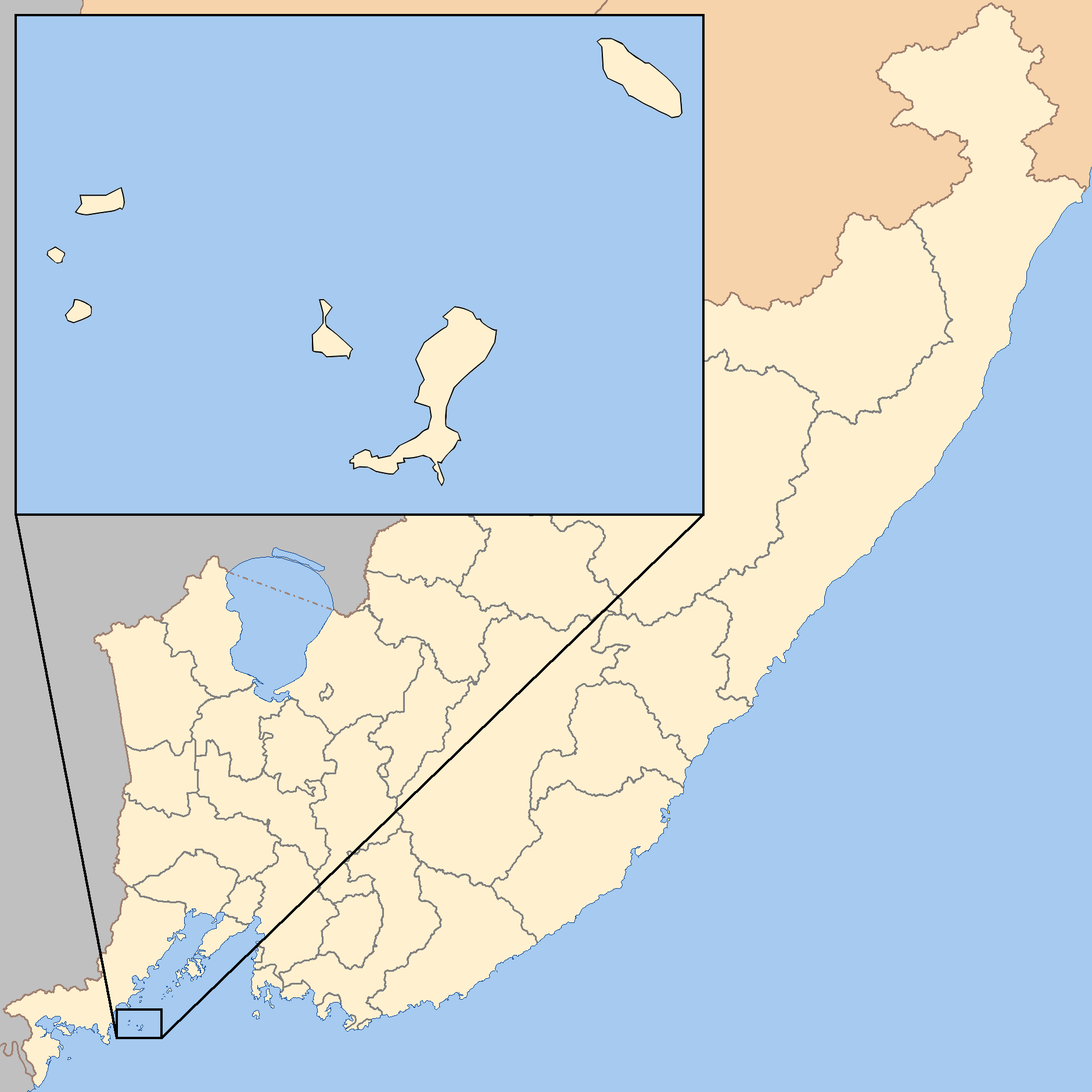 Архипелаг Римского-Корсакова на карте Приморского края